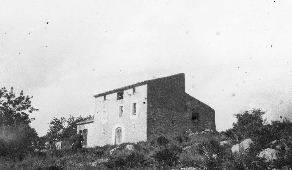 Vista general de Cala Malaca de Monnars. Jordi Audet i Viñals (1927-02)